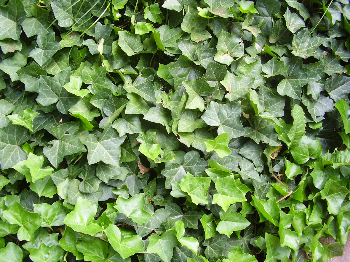 ivy/efeu